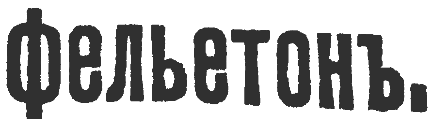 Фельетон